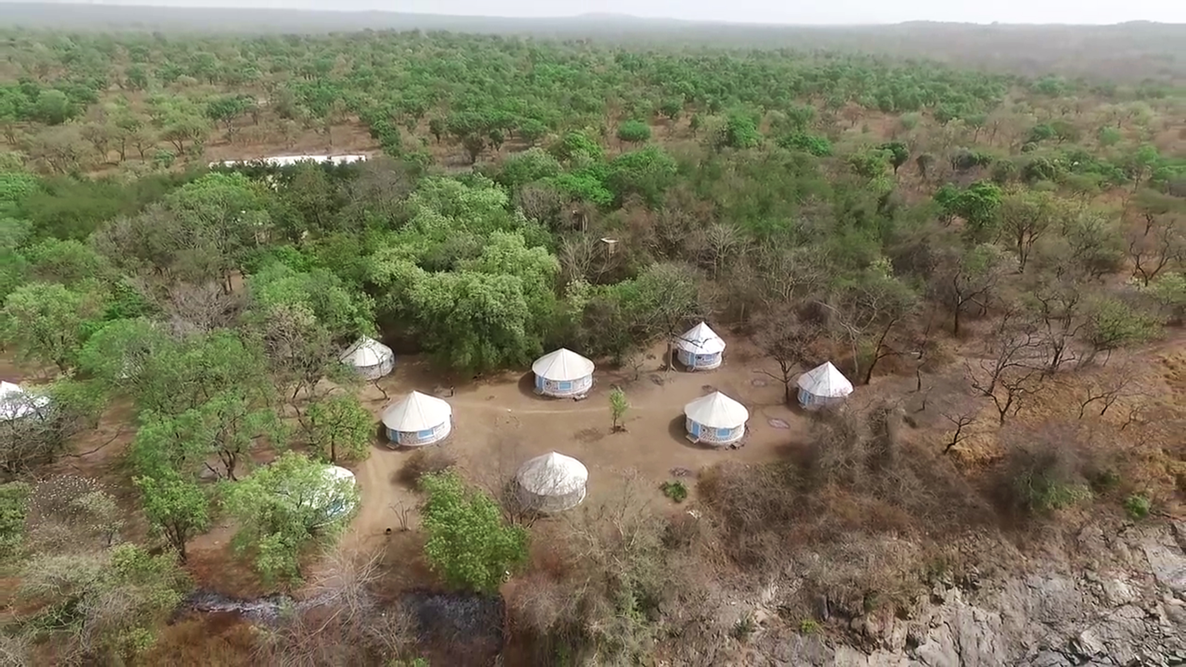 Le parc national de la Benoué est situé dans la région du Nord Cameroun